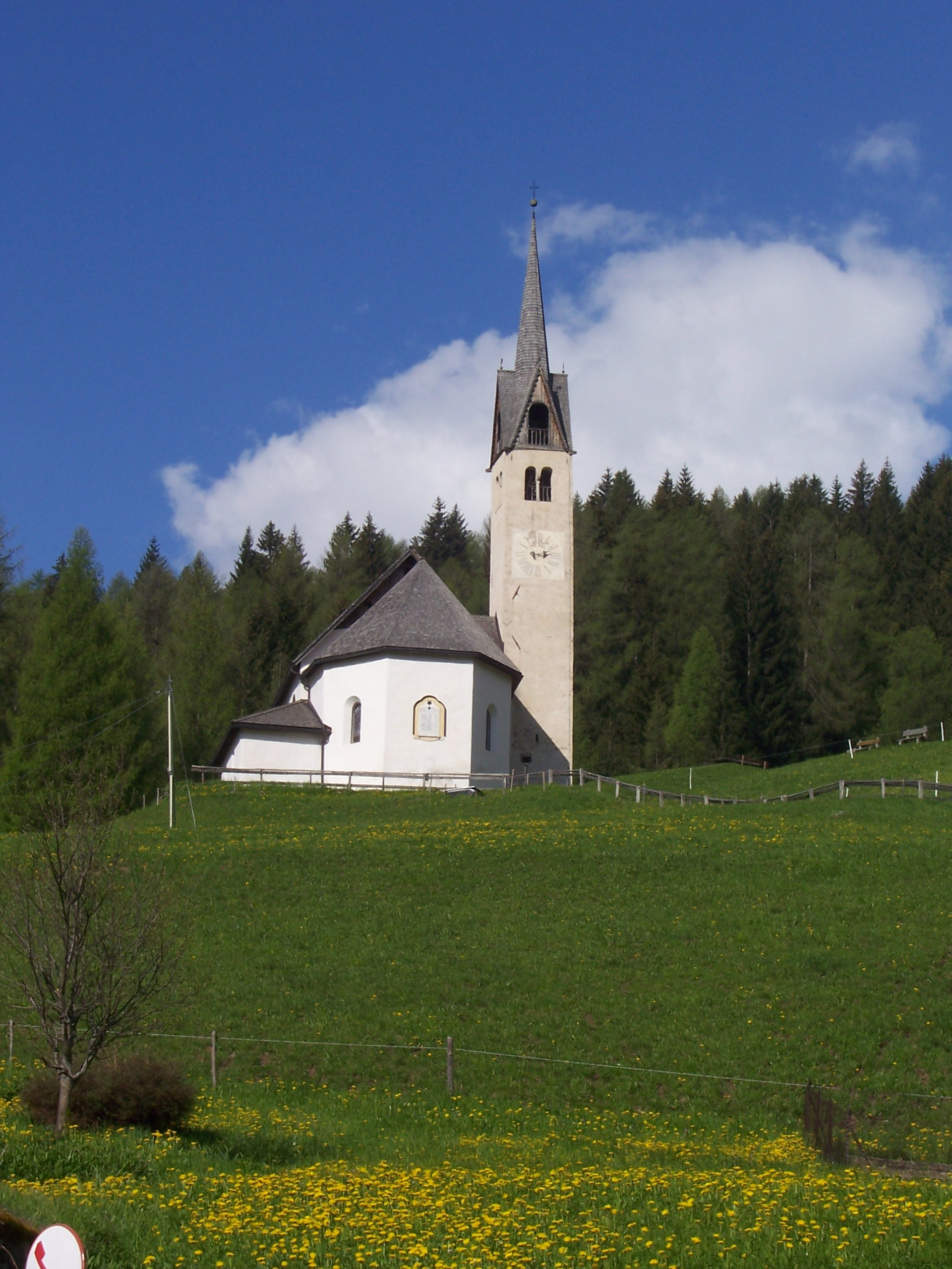 Chiesetta di Caviola in comune di Falcade, provincia di Belluno